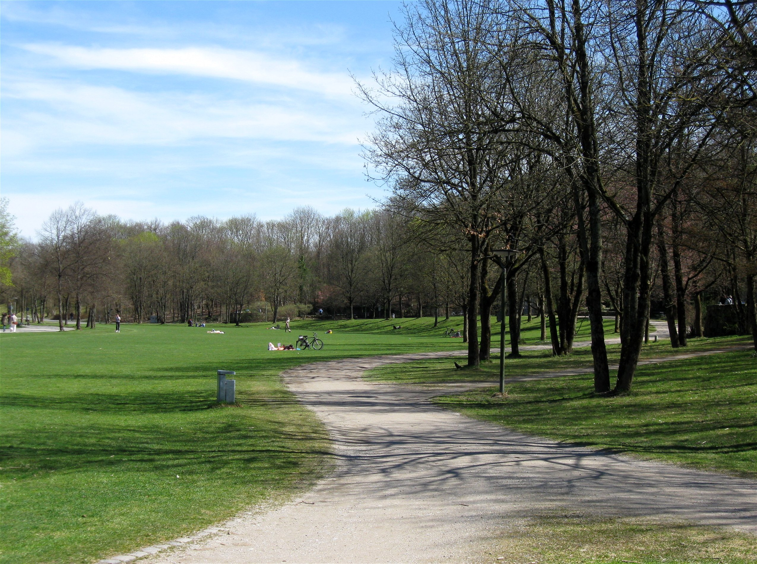 Westpark, München